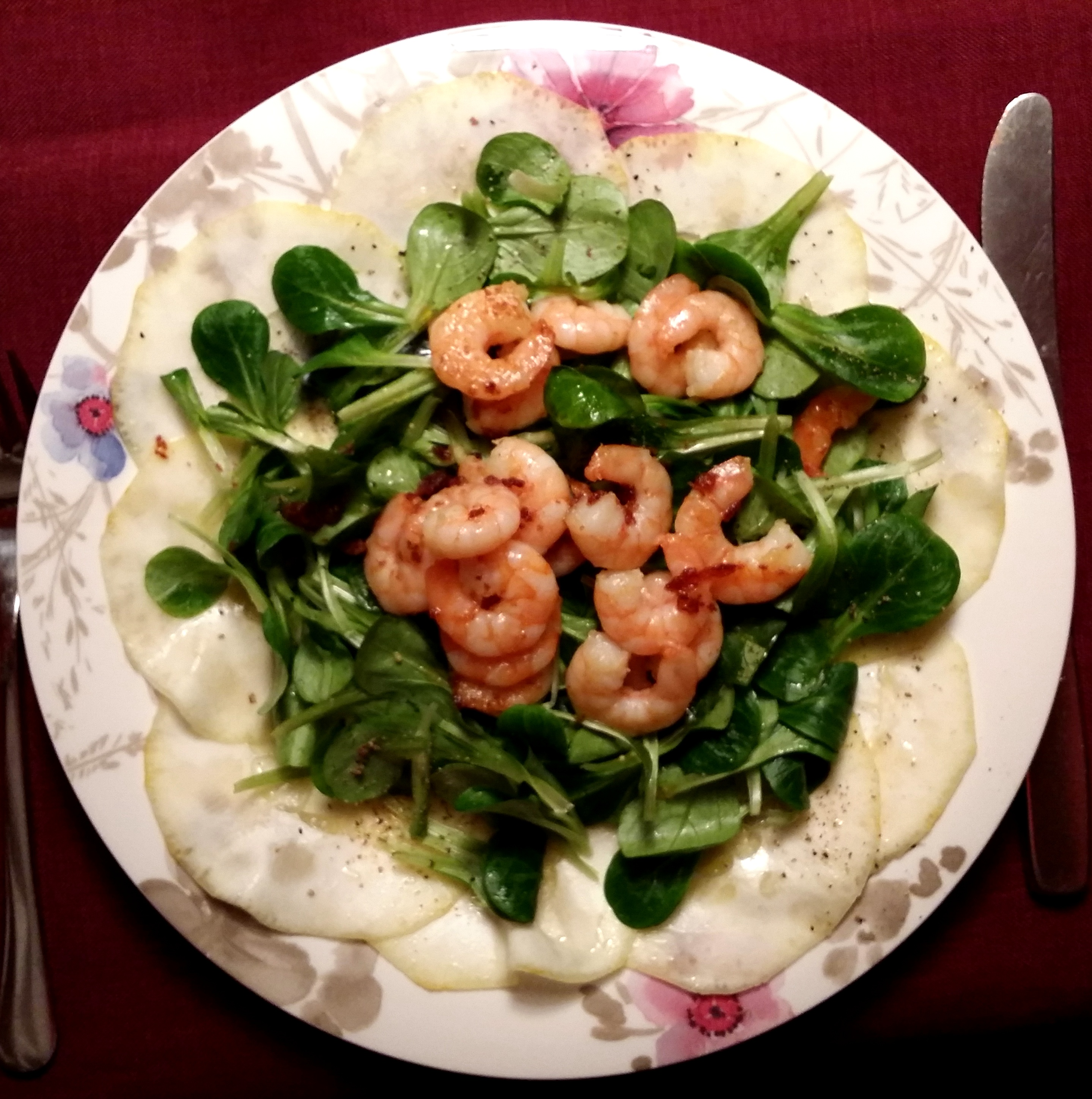 Zitronen-Carpaccio mit Zitronatszitronenscheiben, Feldsalat und Gambas